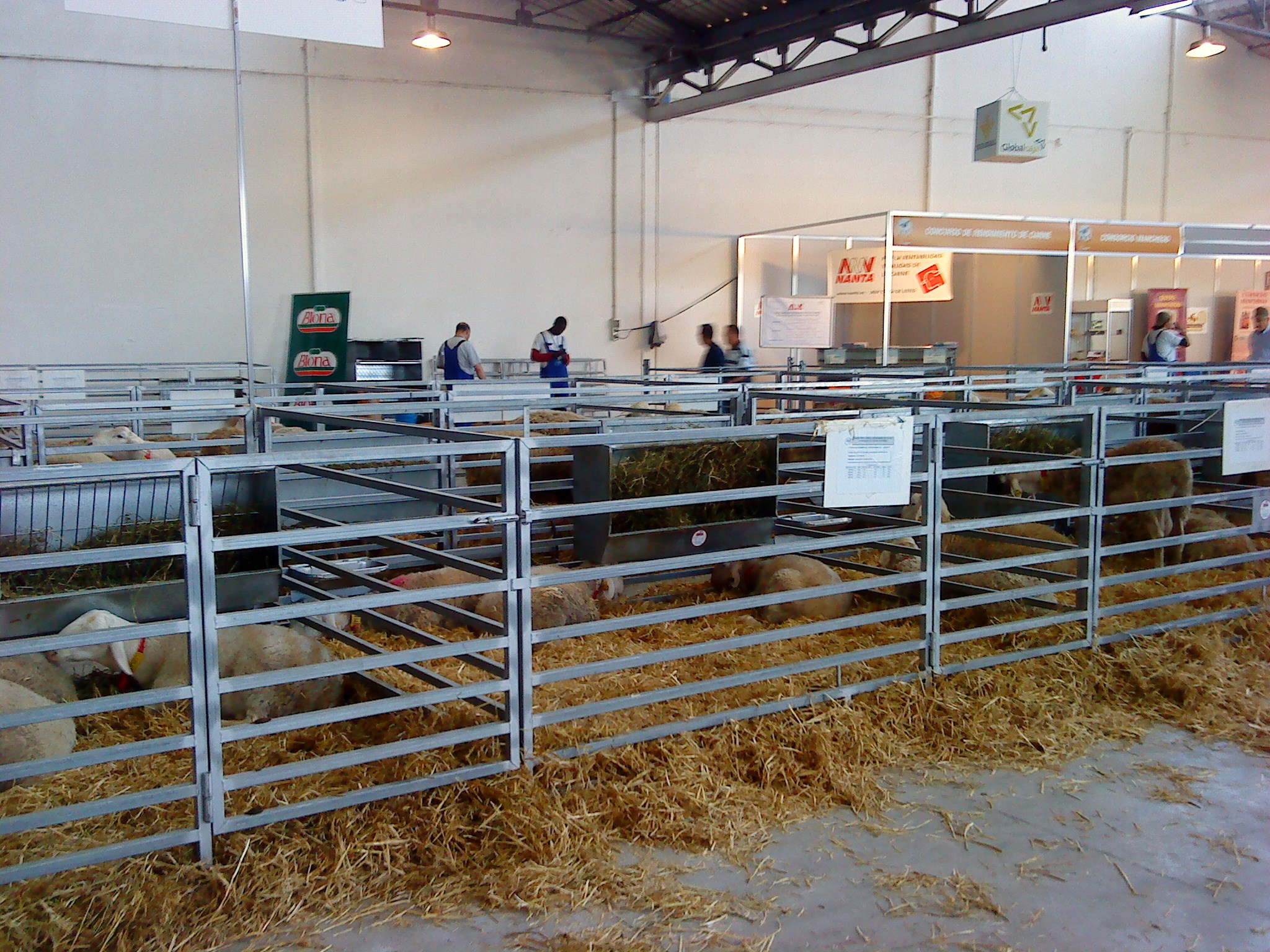 Exposición ganadera dentro de la Feria Expovicaman que tiene lugar en el IFAB de Albacete